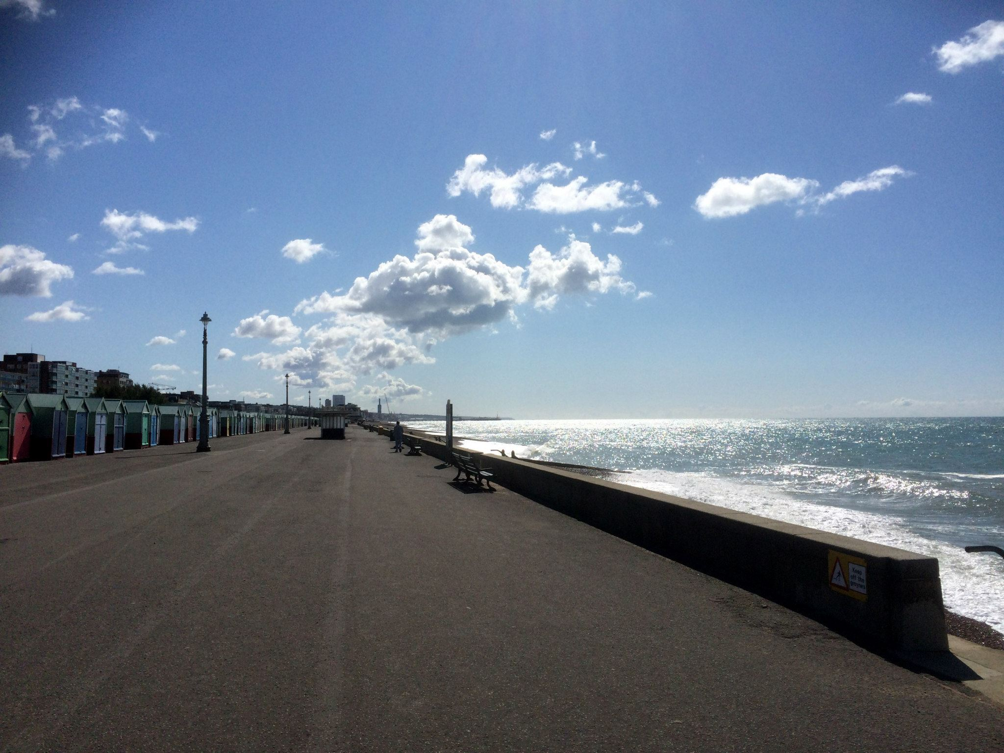 Atlantický oceán kvůli své studené vodě neláká ke koupání, v přímořském letovisku Hove se dá využít množství promenád, ze kterých můžete oceán obdivovat